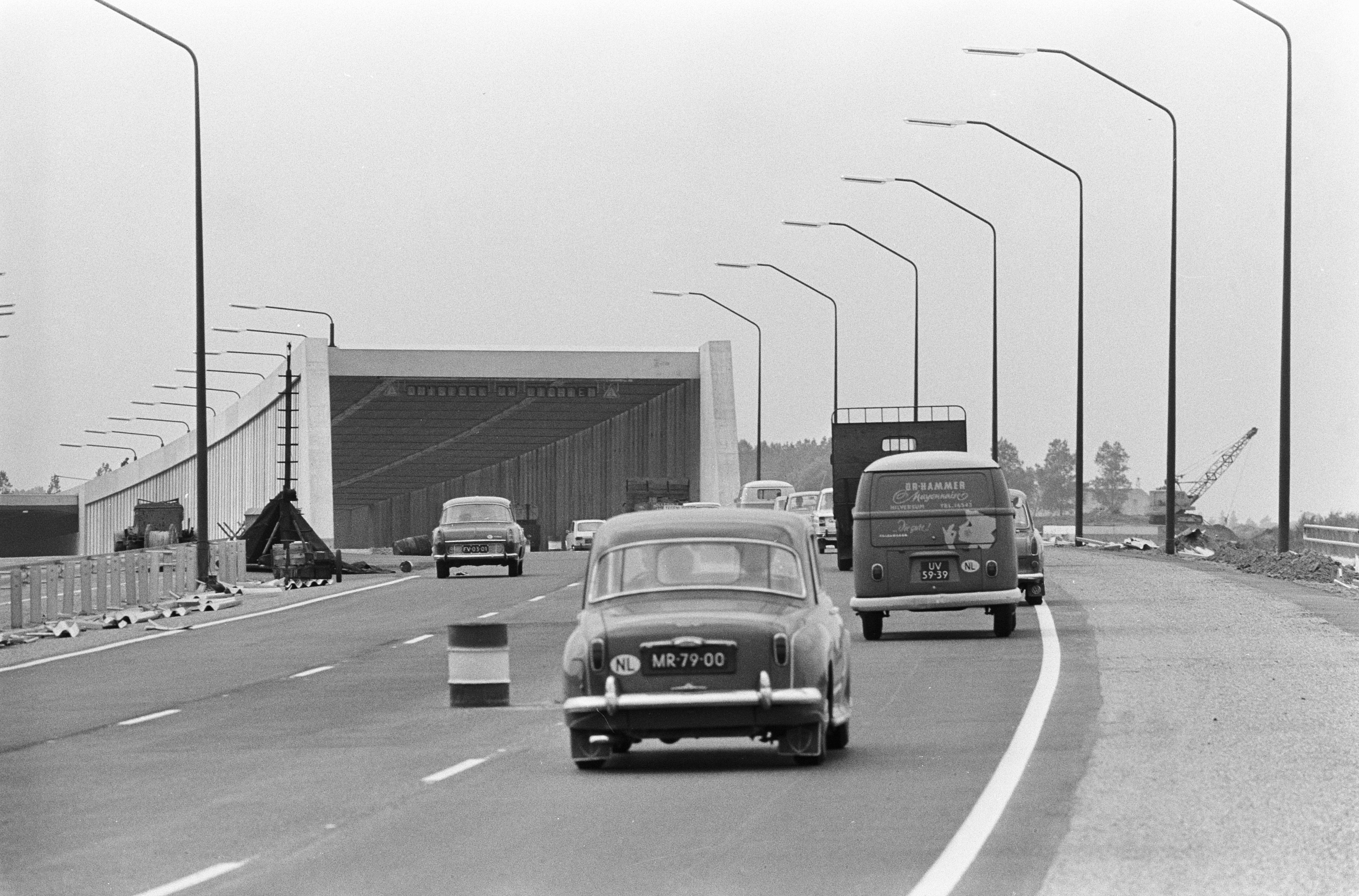 Collectie / Archief : Fotocollectie Anefo Reportage / Serie : Ingebruikname eerste deel van de Schipholtunnel Beschrijving : Ingang van de tunnel aan de Haagse weg (A-4) Datum : 30 augustus 1966 Locatie : Noord-Holland, Schiphol Trefwoorden : auto's, snelwegen, tunnels Fotograaf : Joost Evers / Anefo Auteursrechthebbende : Nationaal Archief Materiaalsoort : Negatief (zwart/wit) Nummer archiefinventaris : bekijk toegang 2.24.01.05 Bestanddeelnummer : 919-5102